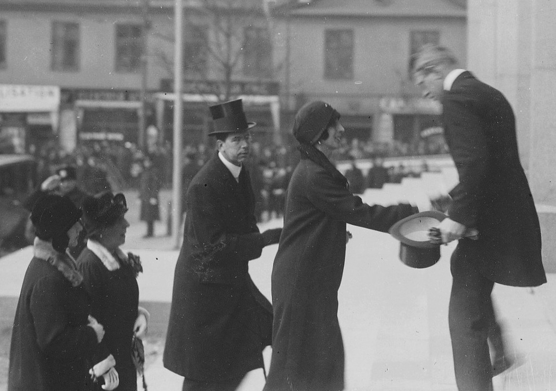 Konserthuset i Stockholm, invigning 7 april 1926, kronprinsparet anländer